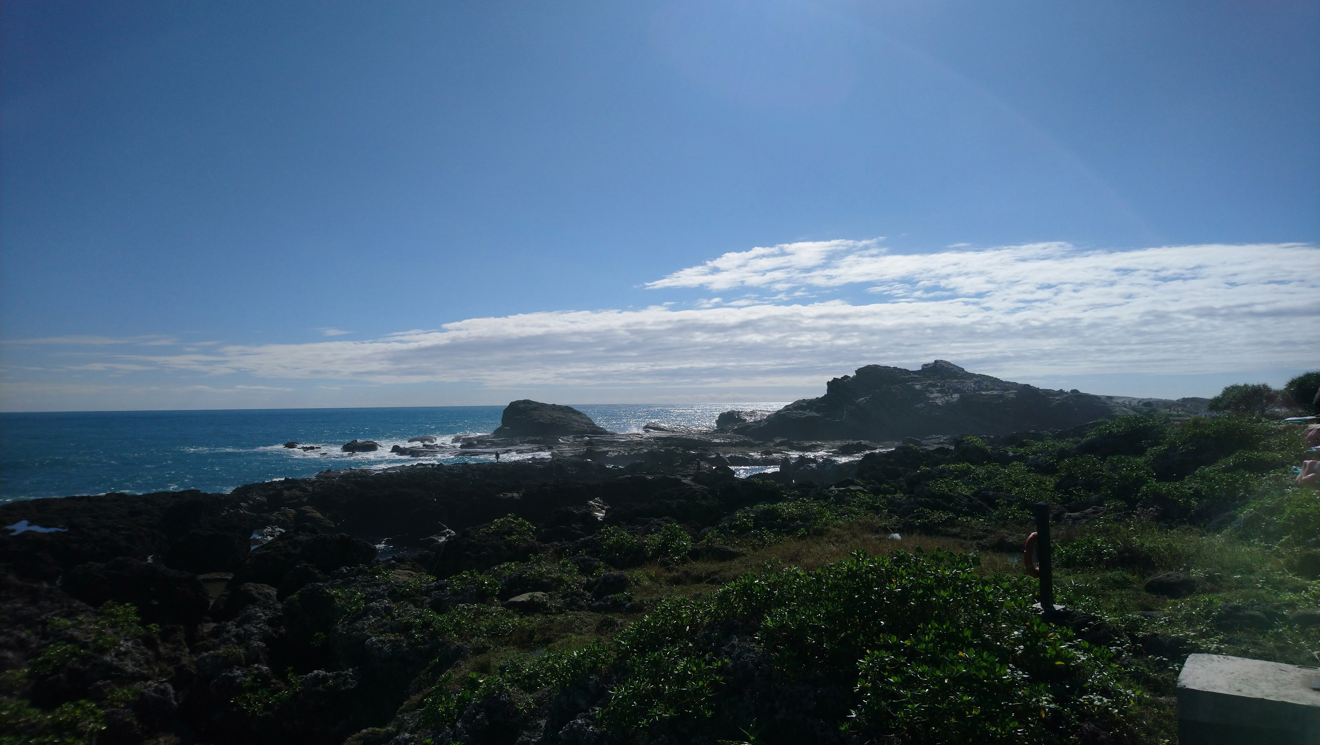 石梯坪的海岸